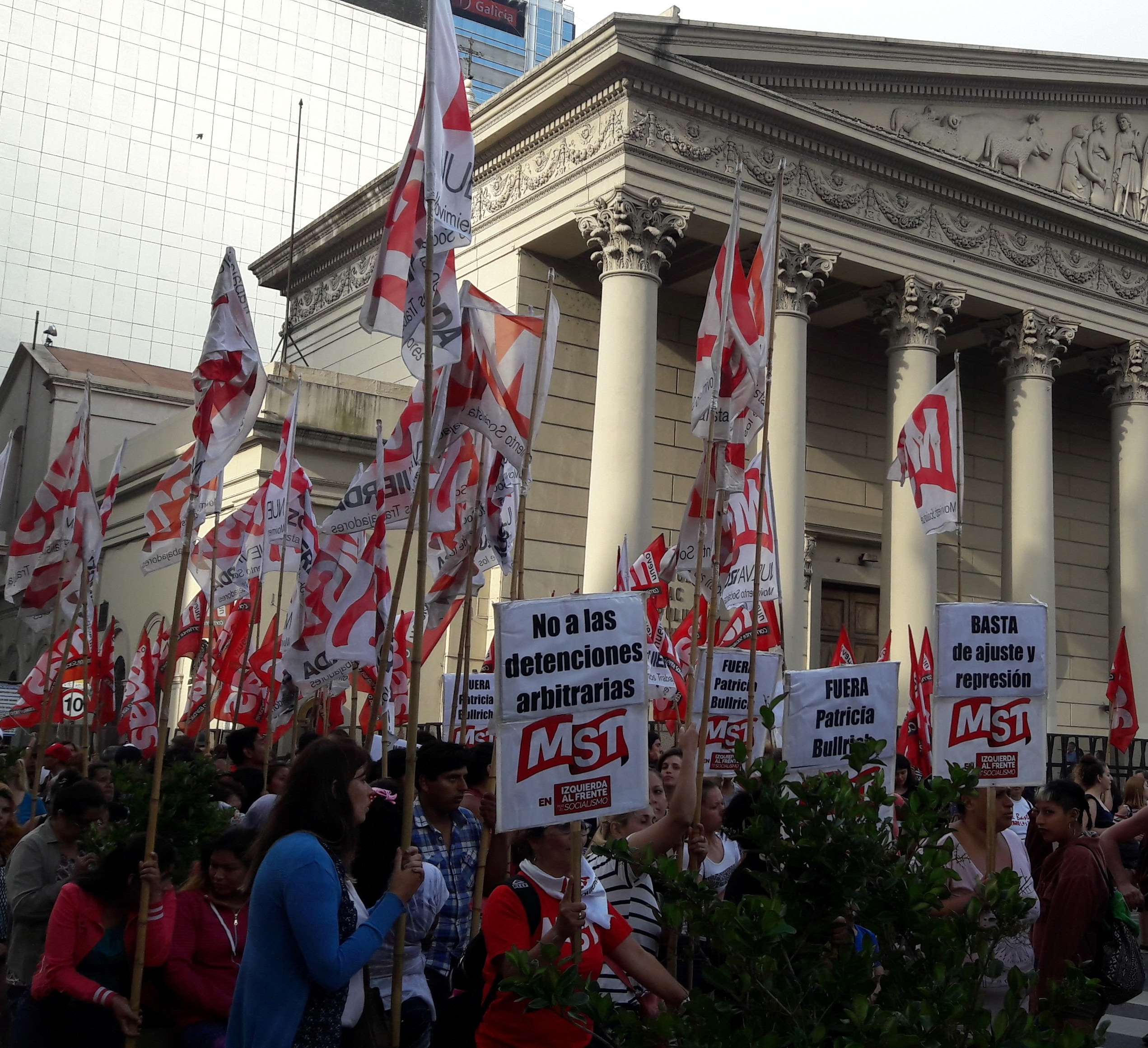 Marcha de la Resistencia 2017, Plaza de Mayo, Buenos Aires, Argentina.